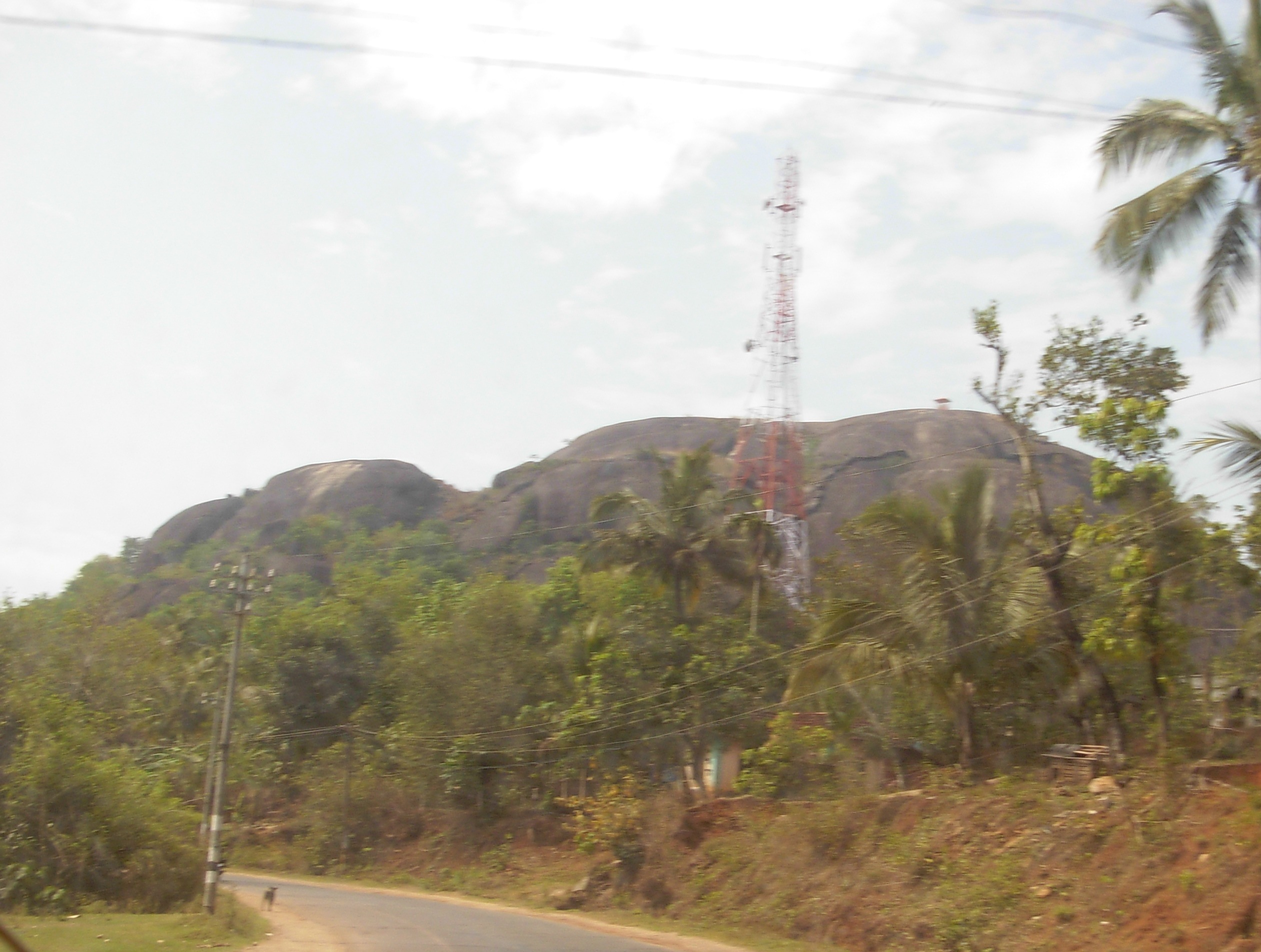 കൊല്ലം ജില്ലയിലെ ചടയമംഗലത്തുള്ള ജഡായു പാറ. ജഡായു എന്ന പരുന്തിനെ രാവണൻ ഇവിടെ വെട്ടി വീഴ്ത്തിയതായി ഐതീഹ്യം.